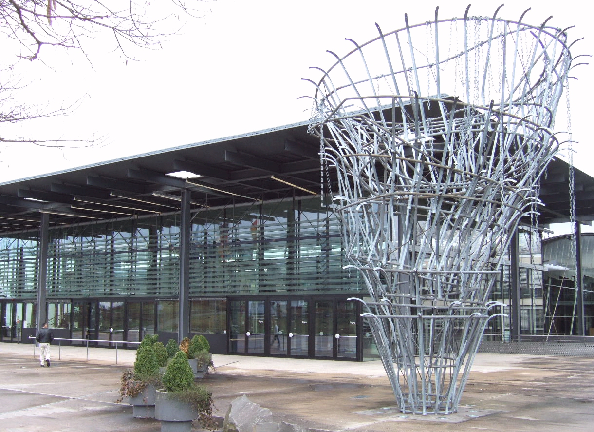 Das Kunstwerk Meistdeutigkeit (1993–1997) von Olaf Metzel vor dem neuen Plenarsaal in Bonn. Material: verzinkte Stahlbleche